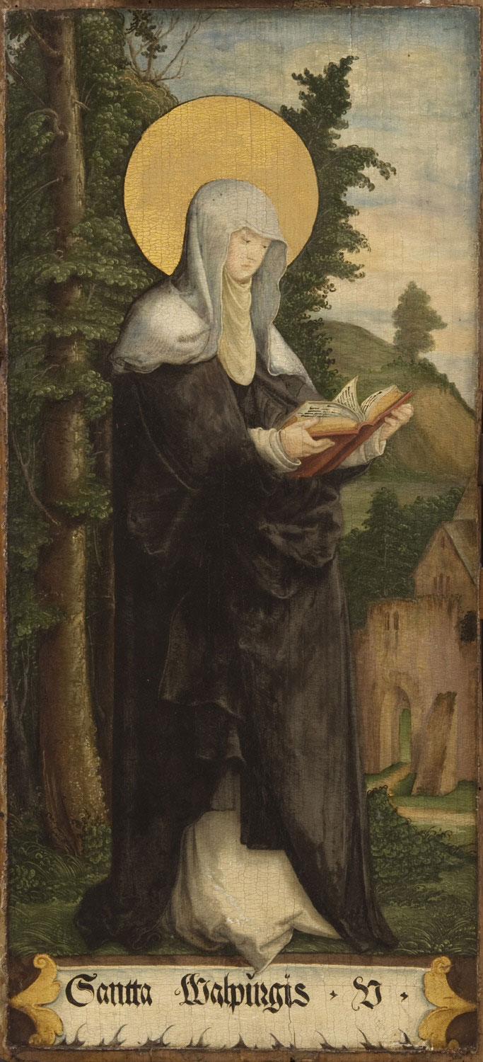 Ausstattung der ehemaligen Seitenaltäre der Meßkircher St. Martinskirche, Standflügel: Heilige Walburga als Märtyrerin Eingescannt aus: Anna Moraht-Fromm und Hans Westhoff: Der Meister von Meßkirch – Forschungen zur südwestdeutschen Malerei des 16. Jahrhunderts, Ulm, 1997, S. 196 links